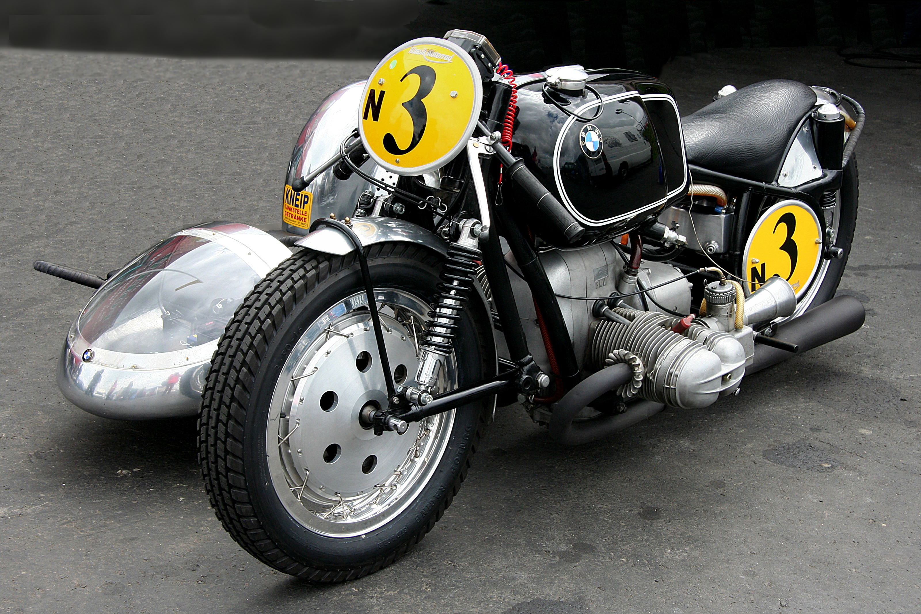 BMW-Renngespann, Baujahr 1958; Eigenbau auf Basis der BMW R 50, wird wahlweise mit Motoren von 500 und 600 cm³ gefahren, 600-cm³-Motor ca. 60 PS (gemessen am Hinterrad), Höchstgeschwindigkeit vom Fahrer geschätzt auf 180 bis maximal 190 km/h